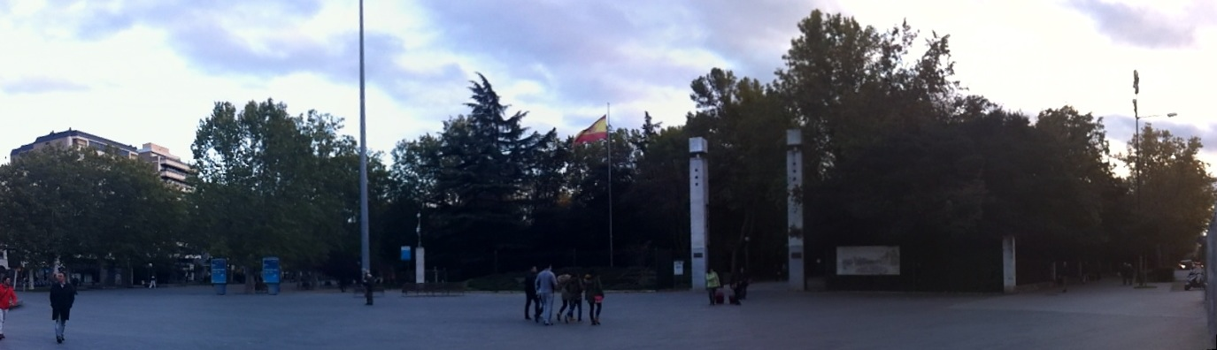 Campo Grande desde plaza Zorrilla (Valladolid)